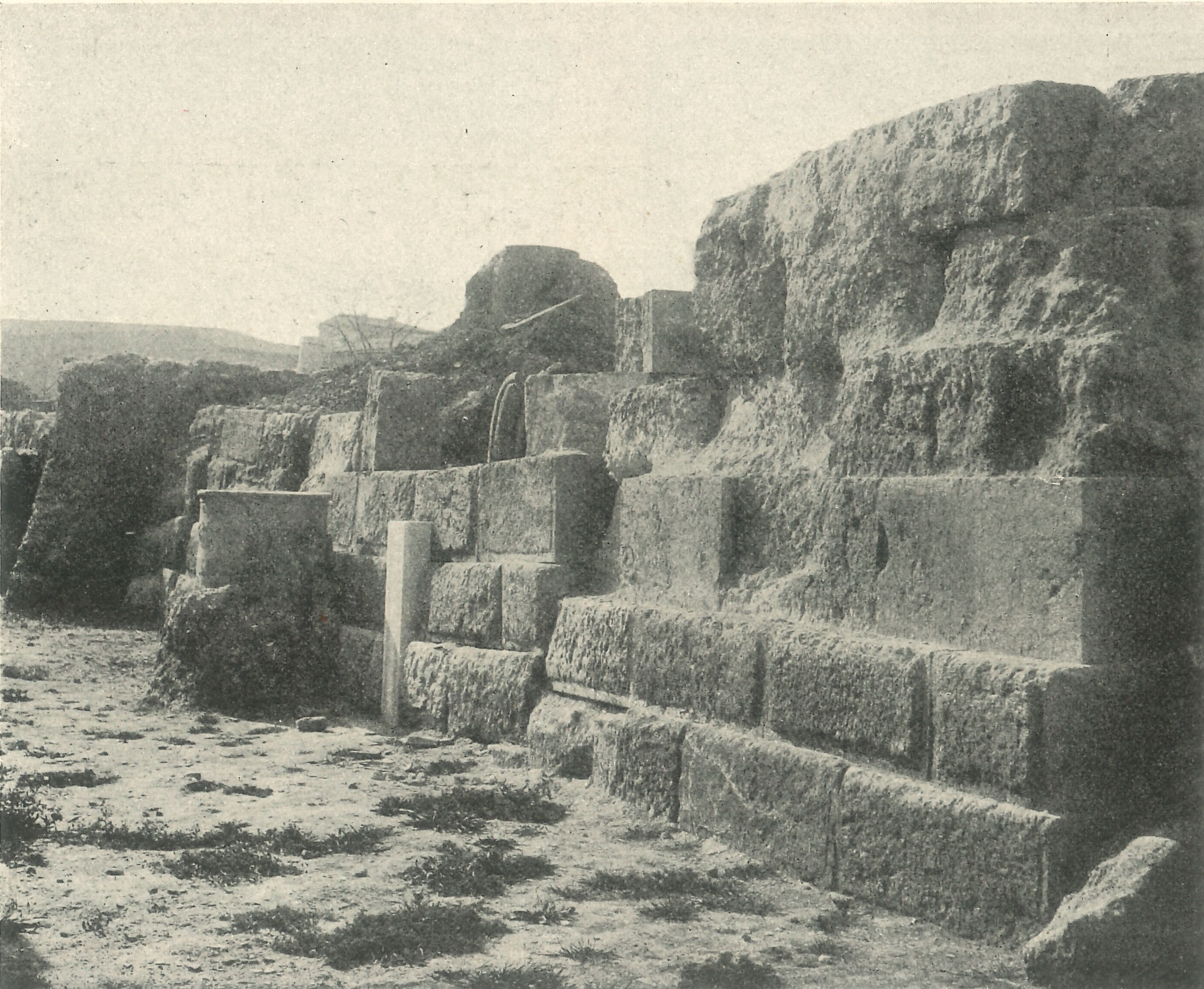 Front des Lakedaimoniergrabes bei der Ausgrabung durch das Deutsche Archäologische Institut 1914/1915, Grabungsfoto